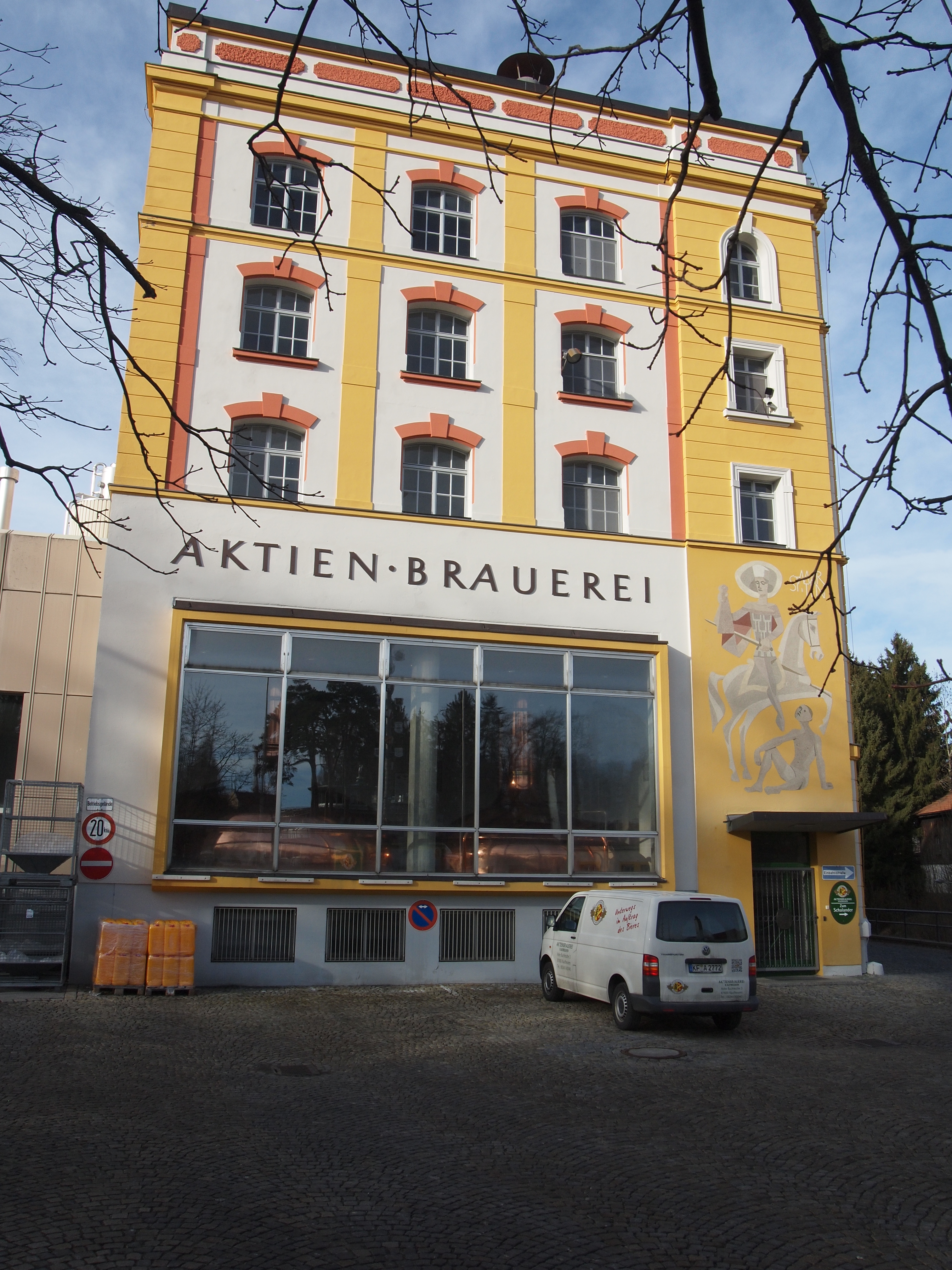 Altes Sudhaus der Aktienbrauerei Kaufbeuren mit Sudkesseln. Hohe Buchleuthe